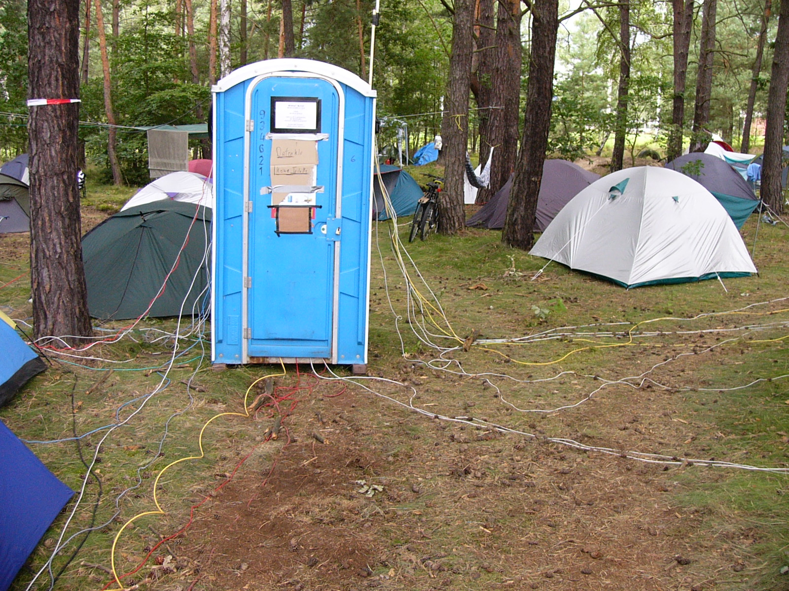 Zelte und ein „Datenklo“ auf dem Chaos Communication Camp, Finowfurt 2007